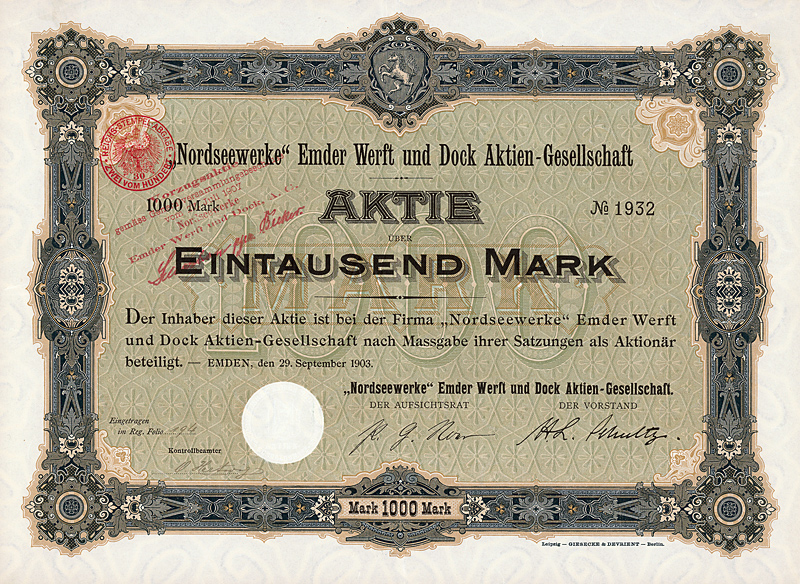 Aktie über 1000 Mark der Nordseewerke Emder Werft und Dock AG vom 29. September 1903